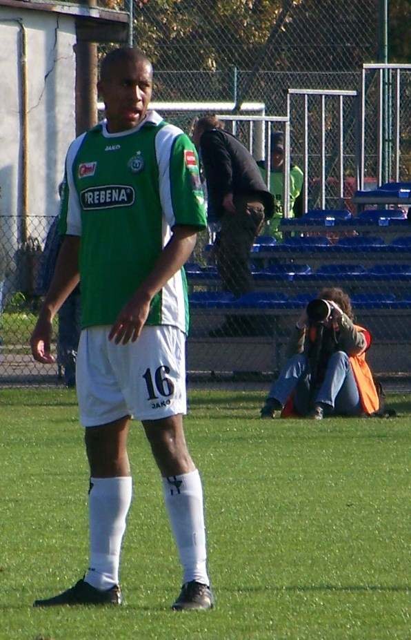 Alain Ngamayama podczas meczu I ligi z Zagłębiem Lubin.